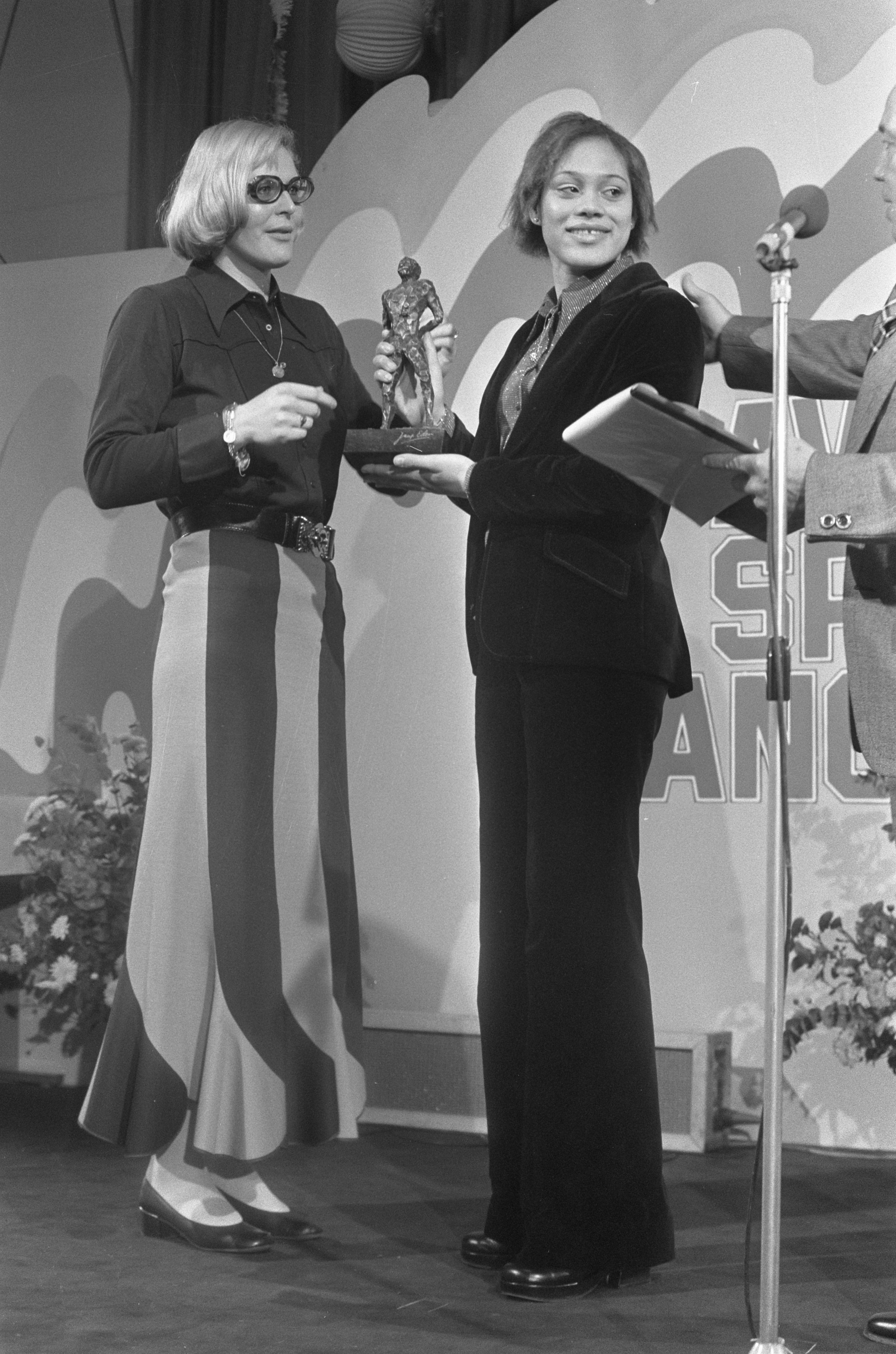 Collectie / Archief : Fotocollectie Anefo Reportage / Serie : Uitreiking AVRO-sportprijzen in het Hiltonhotel te Amsterdam Beschrijving : Ada Kok (links) overhandigt Enith Brigitha het beeldje "Jaap Eden" Datum : 29 december 1973 Locatie : Amsterdam, Noord-Holland Trefwoorden : beelden, sportprijzen, uitreikingen, zwemsters Persoonsnaam : Brigitha, Enith, Kok, Ada Instellingsnaam : Hiltonhotel Fotograaf : Fotograaf Onbekend / Anefo Auteursrechthebbende : Nationaal Archief Materiaalsoort : Negatief (zwart/wit) Nummer archiefinventaris : bekijk toegang 2.24.01.05 Bestanddeelnummer : 926-9093